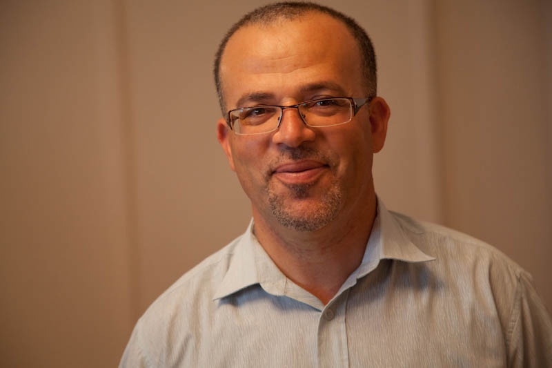 Samir Dilou, membre du bureau exécutif du parti Ennahda